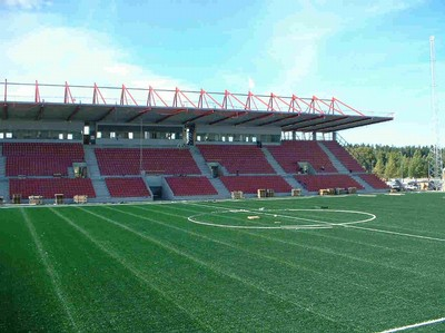 Assyriska/Syrianskas Fotbollsstadion i Södertälje